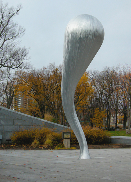 Jean-Pierre Morin, « Trombe », sculpture installée le 5 novembre 2008 sur le parvis du Musée national des beaux-arts du Québec. Québec (Québec) Canada